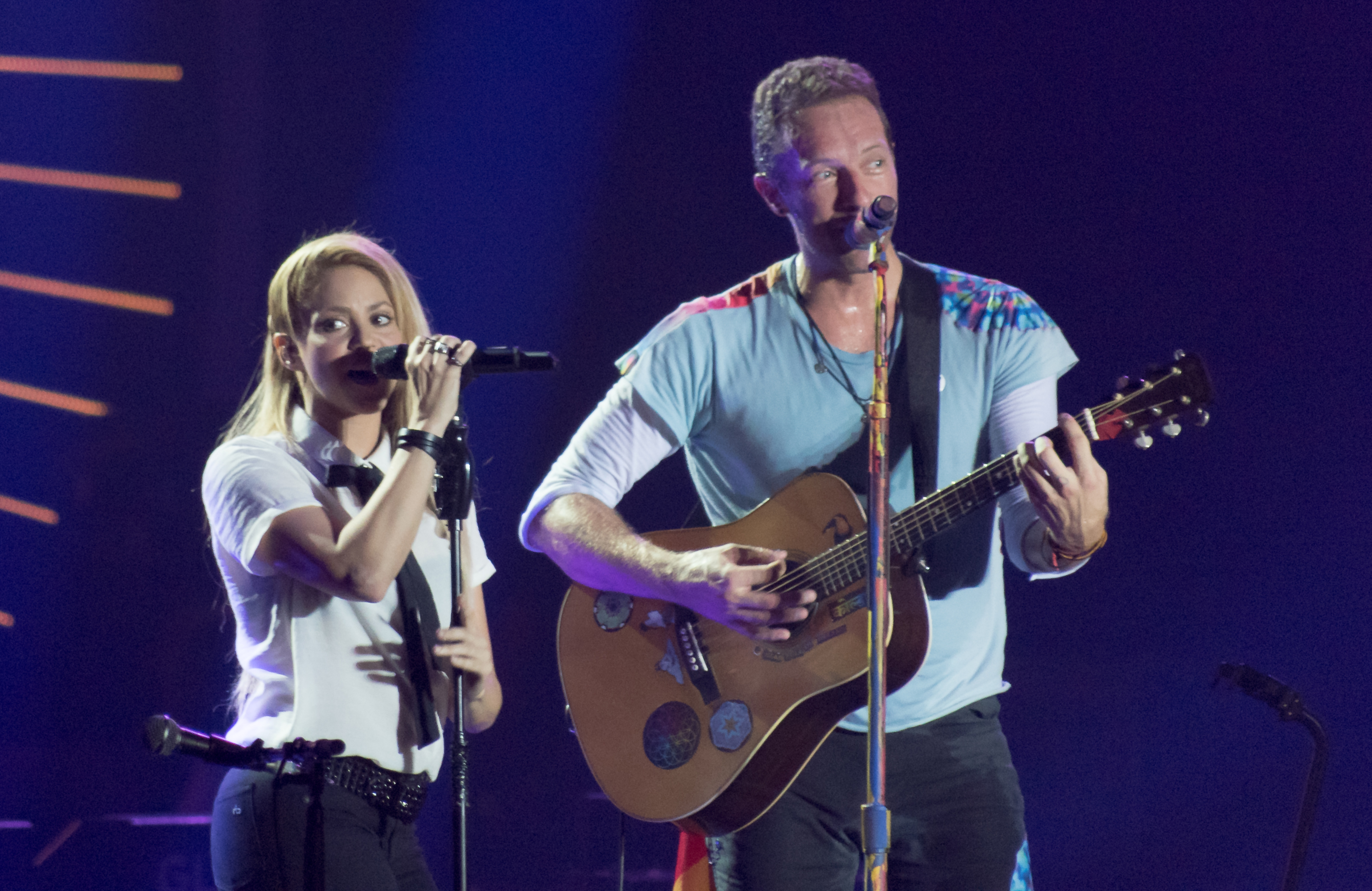 Shakira und Chris Martin beim Global Citizen Festival 2017